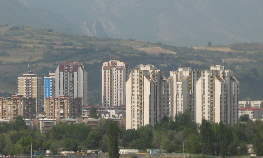 Кули во Карпош 4 во Скопје